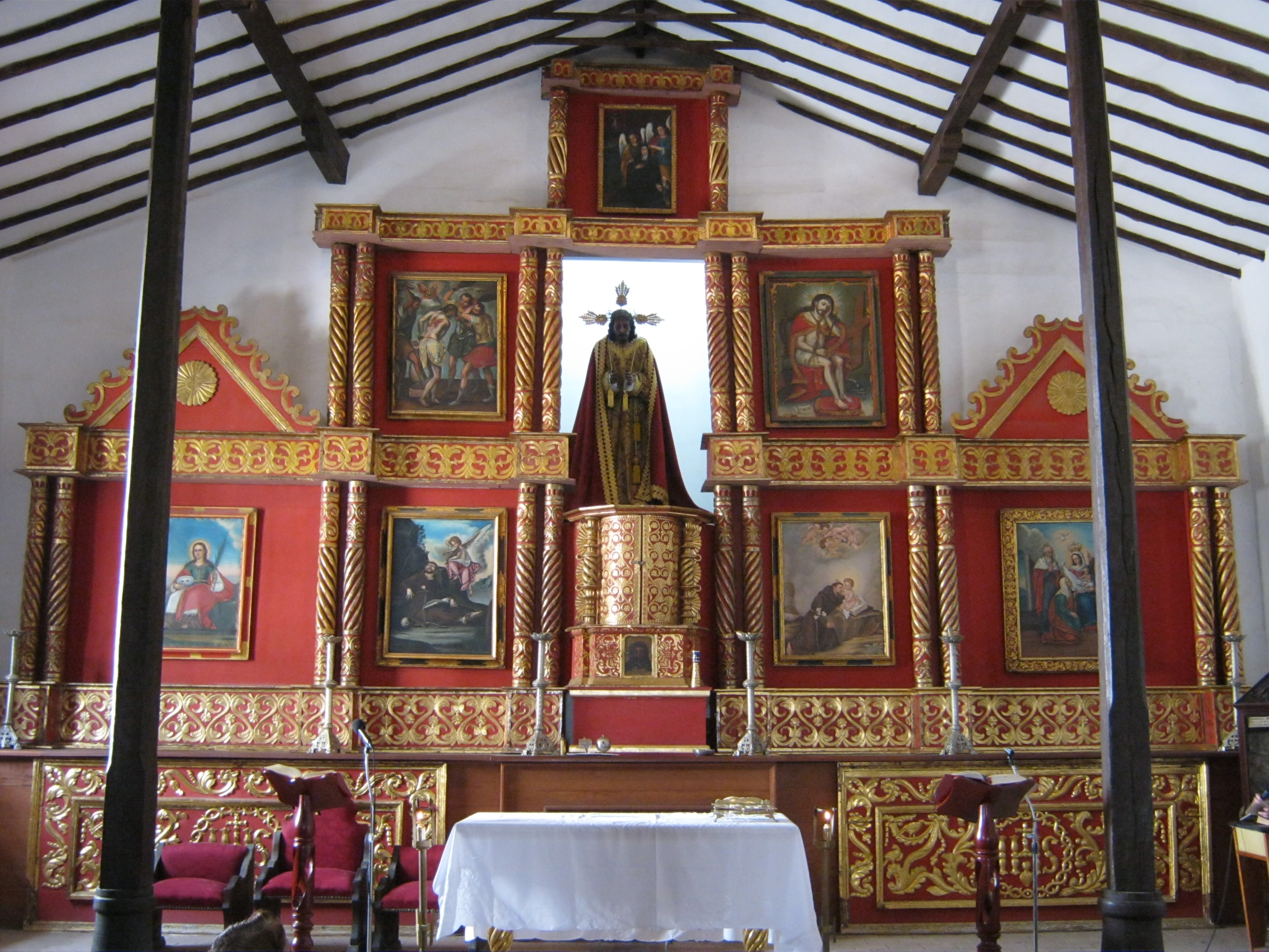 Capilla de Jesús Nazareno, municipio de Marinilla. Colombia.